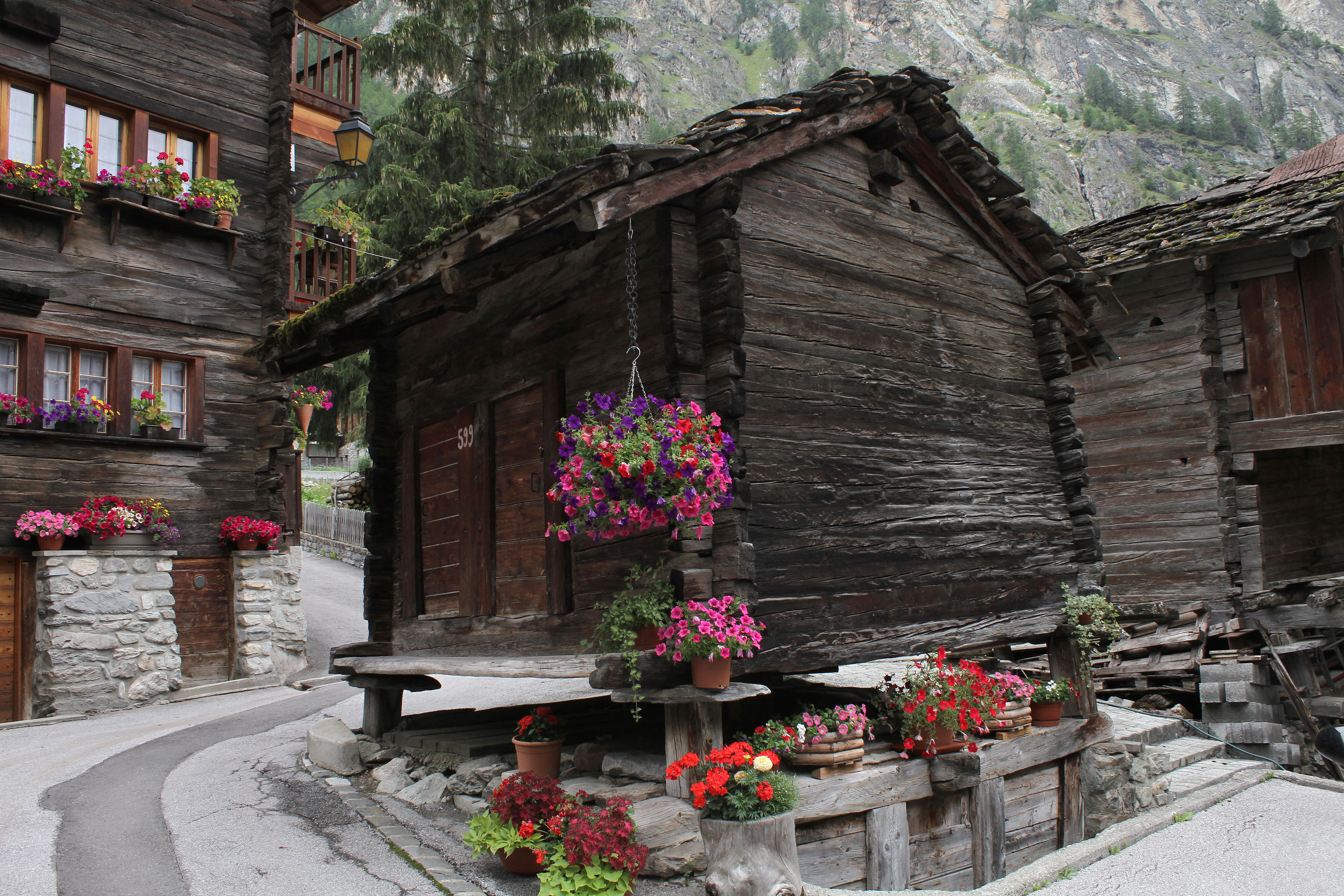 Raccard (grenier) traditionnel du village d'Evolène, dans le Val d'Hérens, dans le canton du Valais, en Suisse